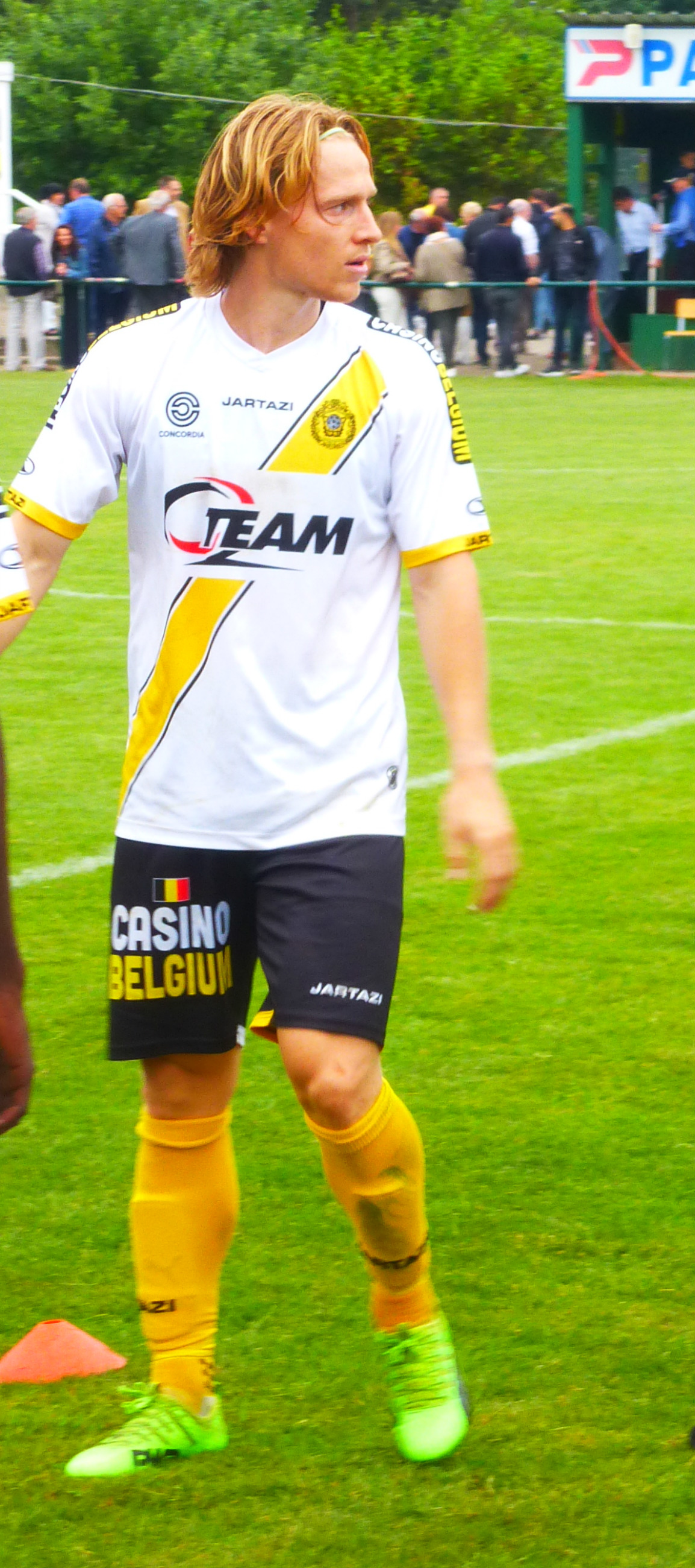 Guus Hupperts